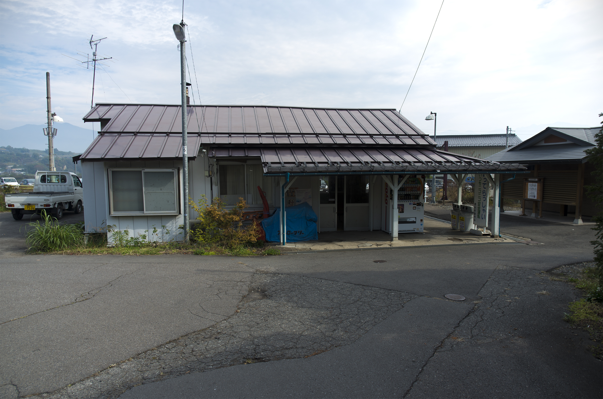 東日本旅客鉄道株式会社飯山線上今井駅駅舎